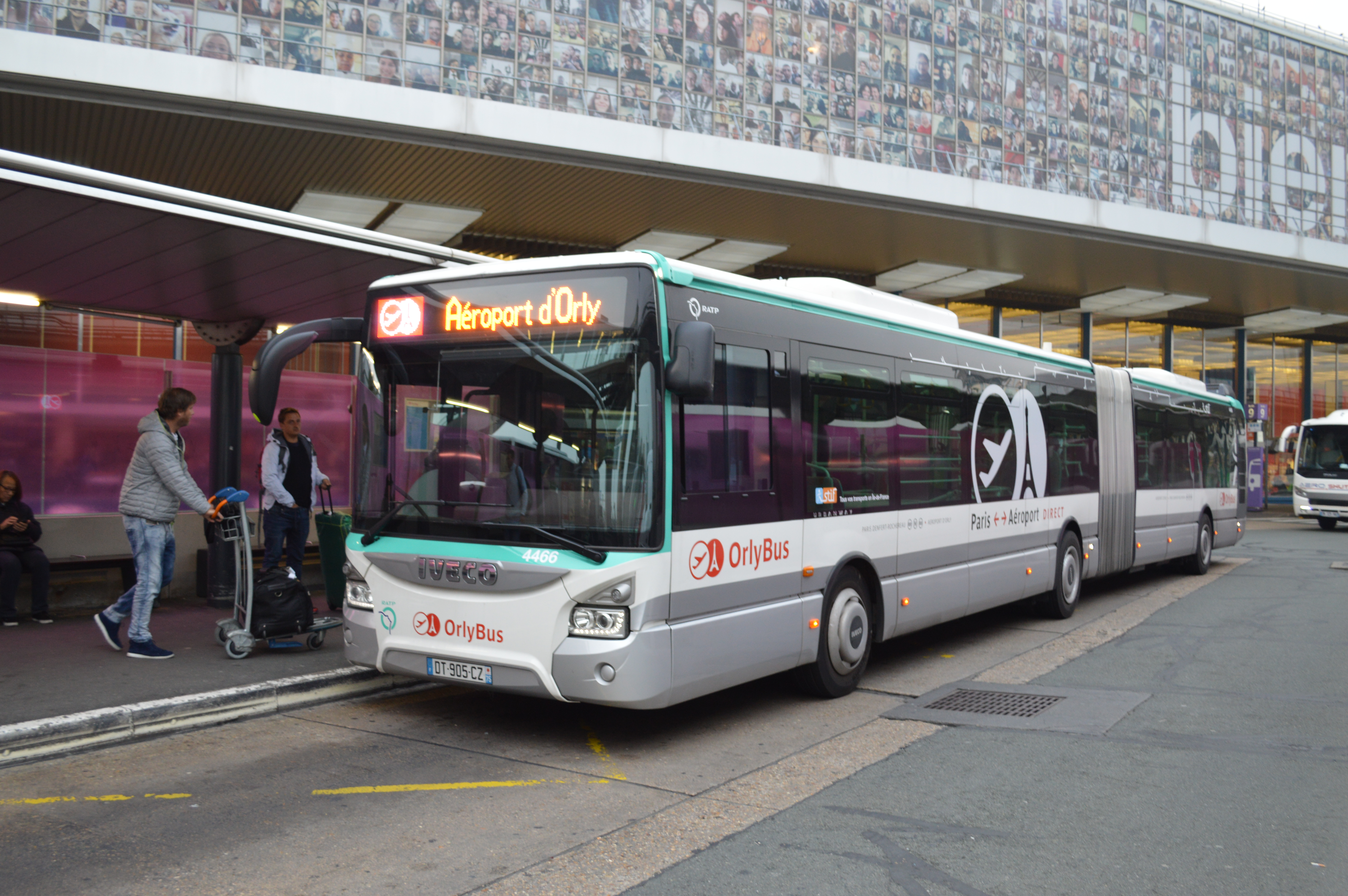 Iveco Bus Urbanway 18 n°4466 du Orlybus photographié à son terminus à Orly-Sud